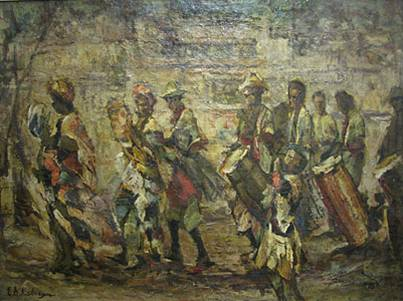 EDKabregu Comparsa